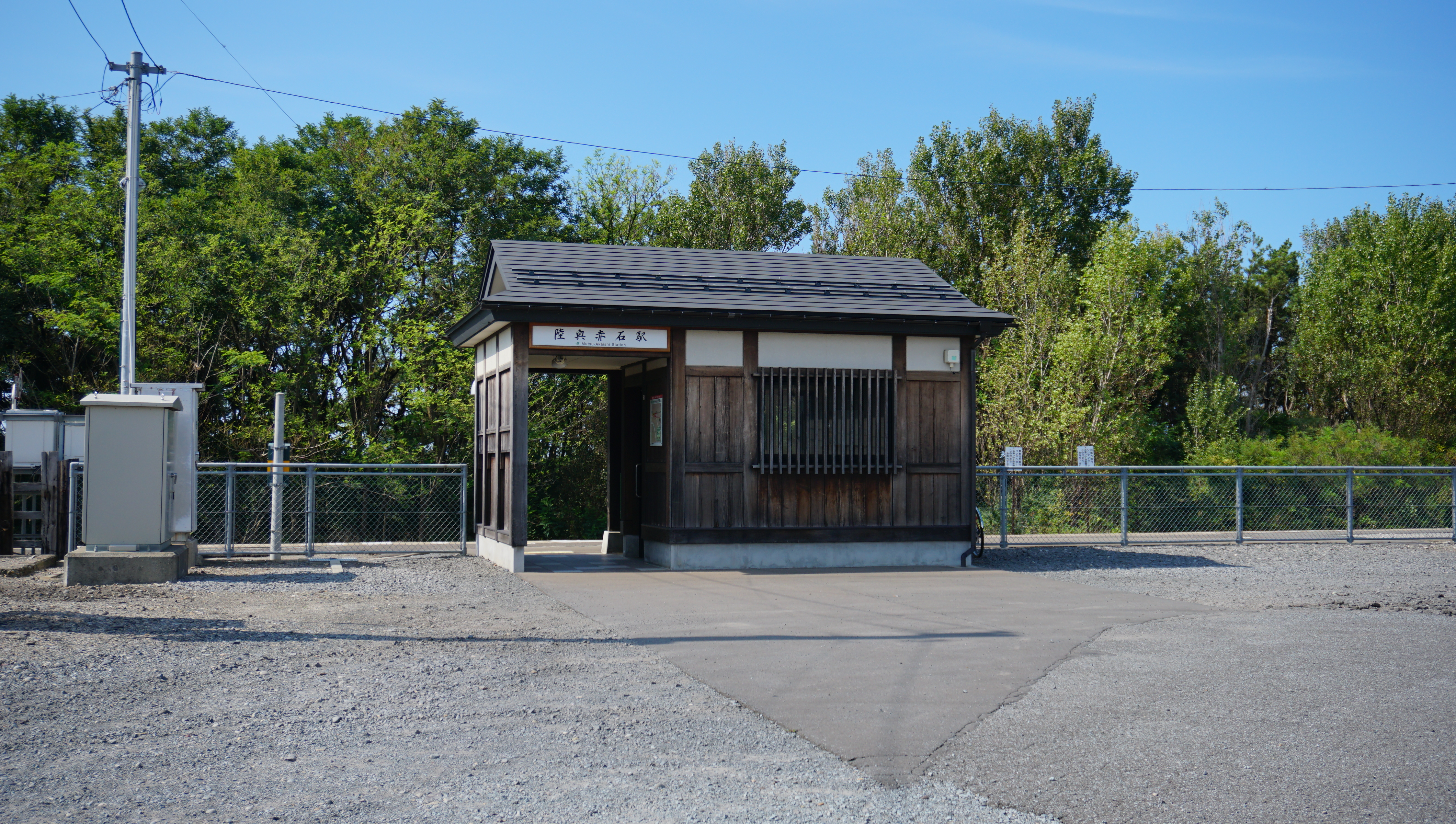 五能線 陸奥赤石駅（青森県西津軽郡鰺ヶ沢町）